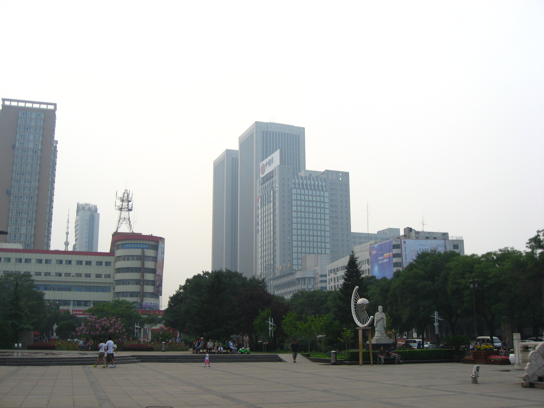 太原市中心, 山西, Taiyuan